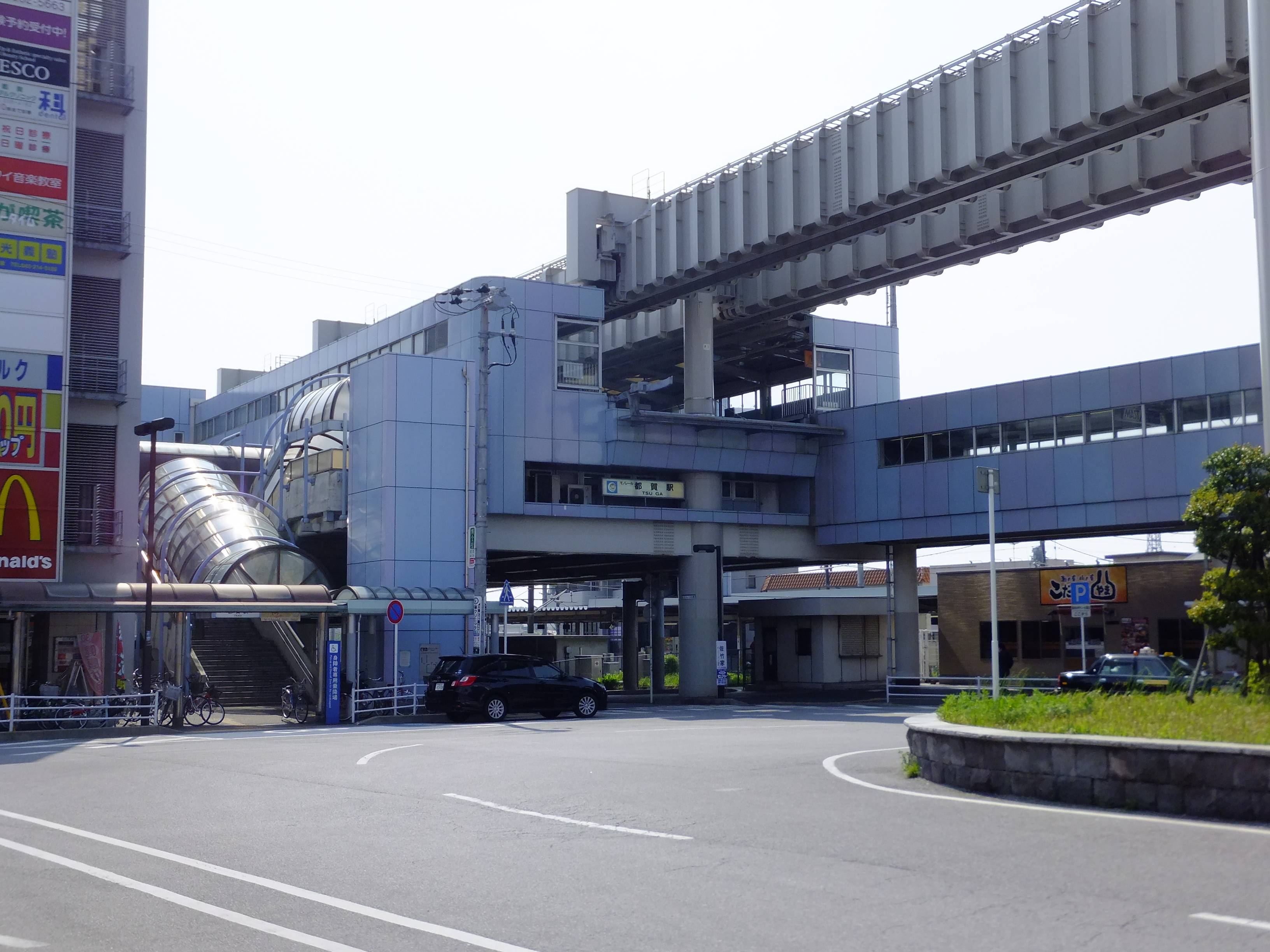 千葉都市モノレール都賀駅